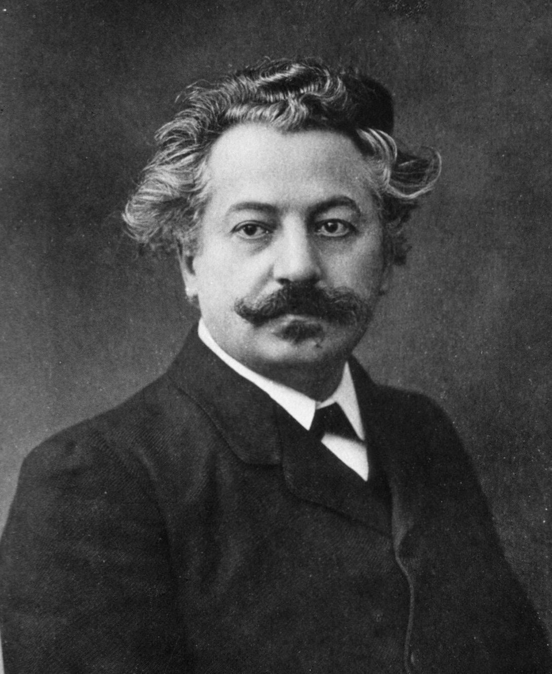 Portrait du Prof. Jaboulay (Oeuvre du graveur F. Vally)